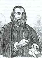 István Séllyei Balog, Hungarian Calvinist bishop. Séllyei Balog István, református püspök